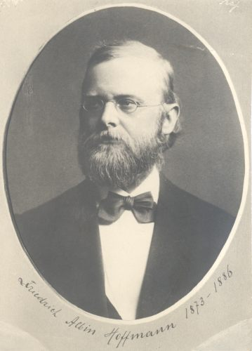 Friedrich Albin Hoffmann, saksa arstiteadlane